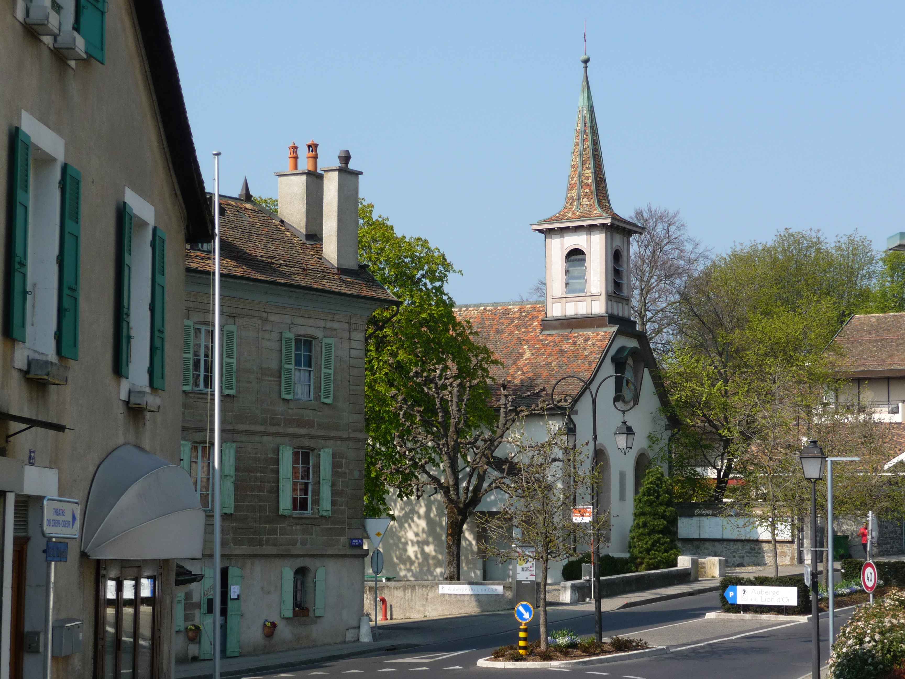 Vue du centre de Cologny